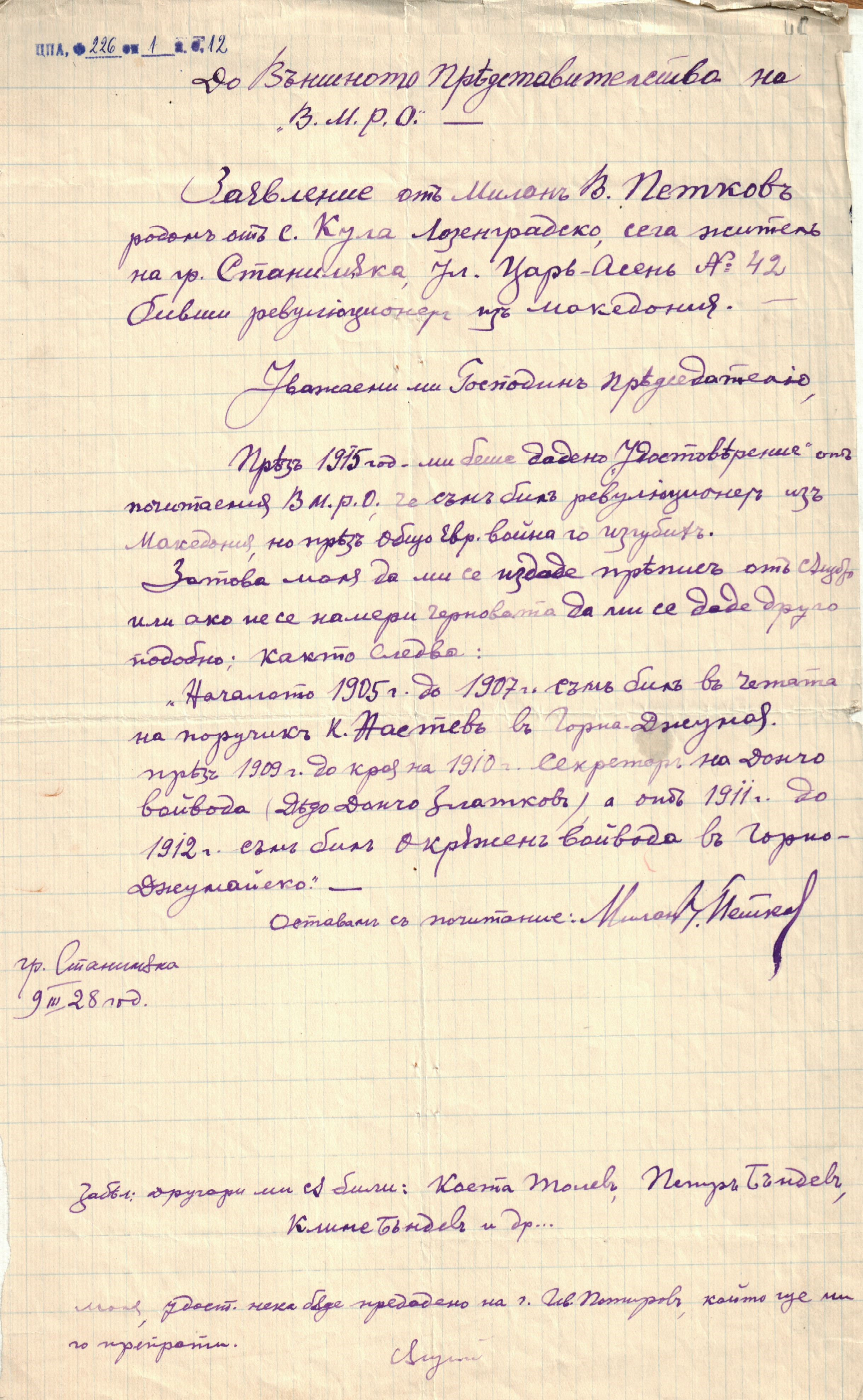 Писма от лица и ВМРО до ЦК и ЗП на ВМОРО за връзки с гръцки четници по време на Илинденското въстание, организирането на чети от Герджиков(ич) в Сърбия; връзки между ВМОРО и арменската революционна организация „Дашнакцутюн“, събиране на федеристи и комунисти в читалище „Гоце Делчев“ в София; дейността на П. Шатев, М. Герджиков и Спиро Василев сред емиграцията в Цариград; разпределяне работата в пунктовете и др.